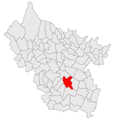 Categorie:Hărţi ale judeţului Buzău